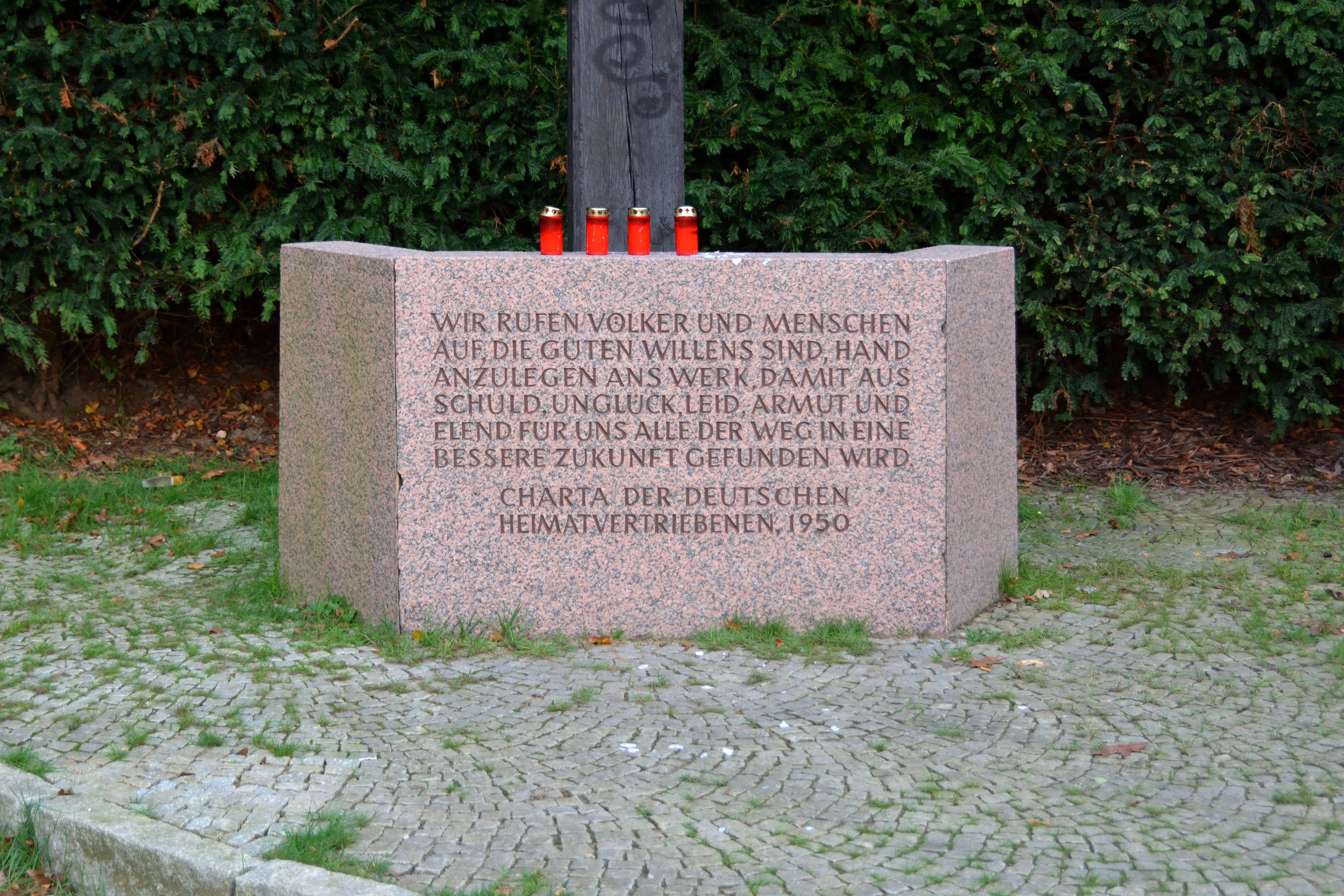 Das Ehrenmal am Germanengrab in Itzehoe